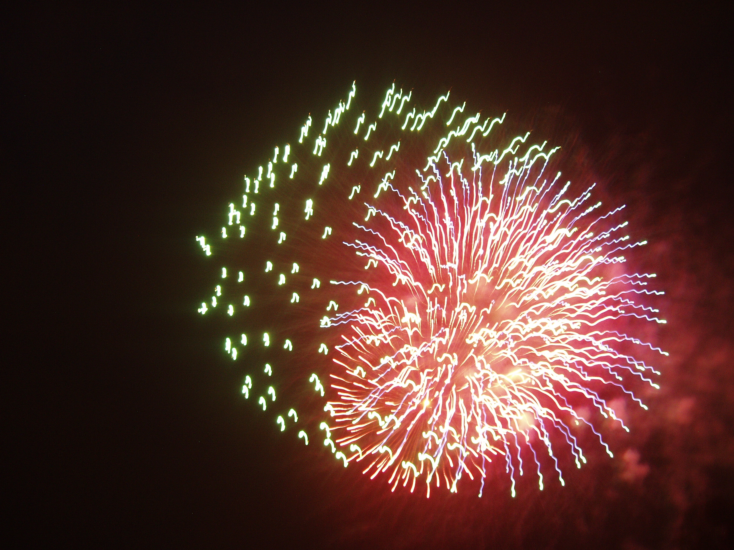 Feuerwerk beim Stuttgarter Lichterfest